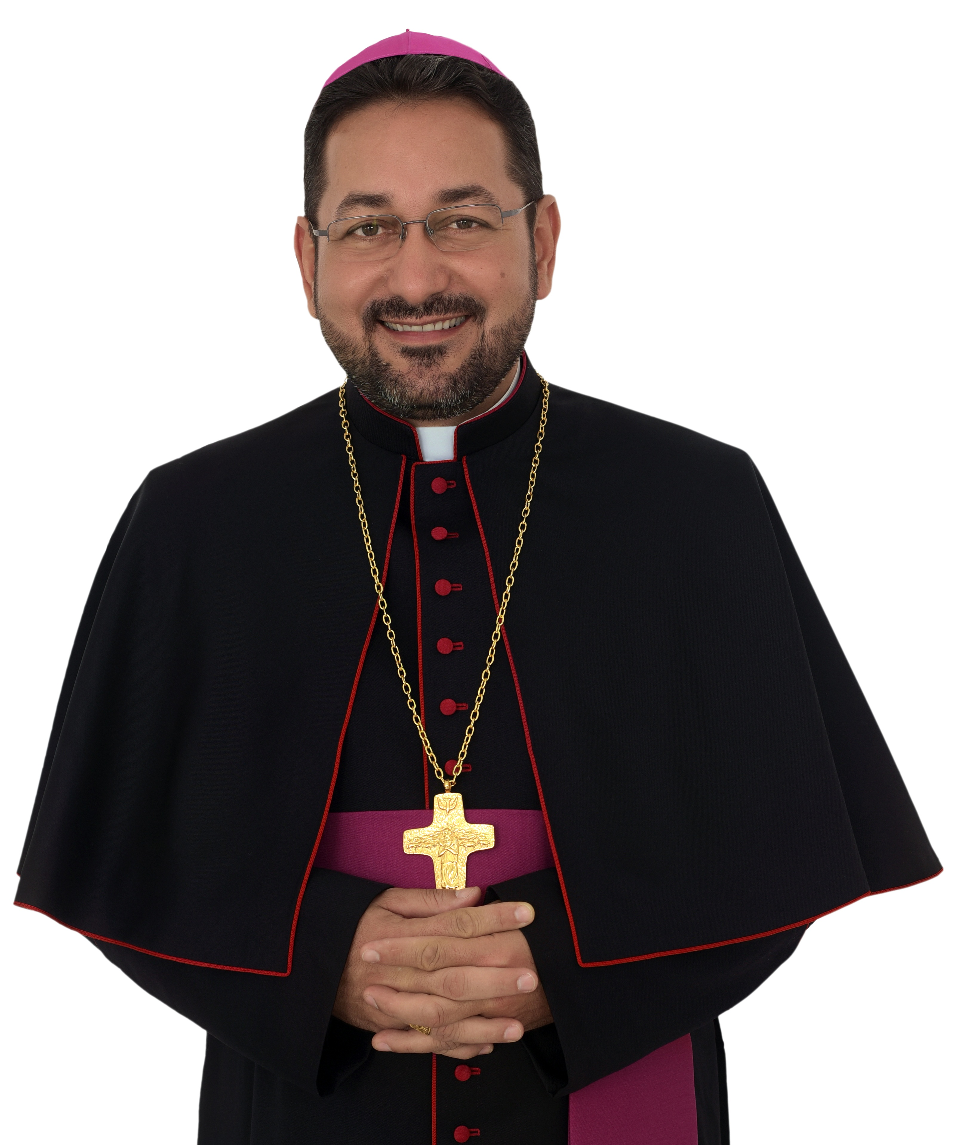 Foto de Dom Rubival Cabral Britto